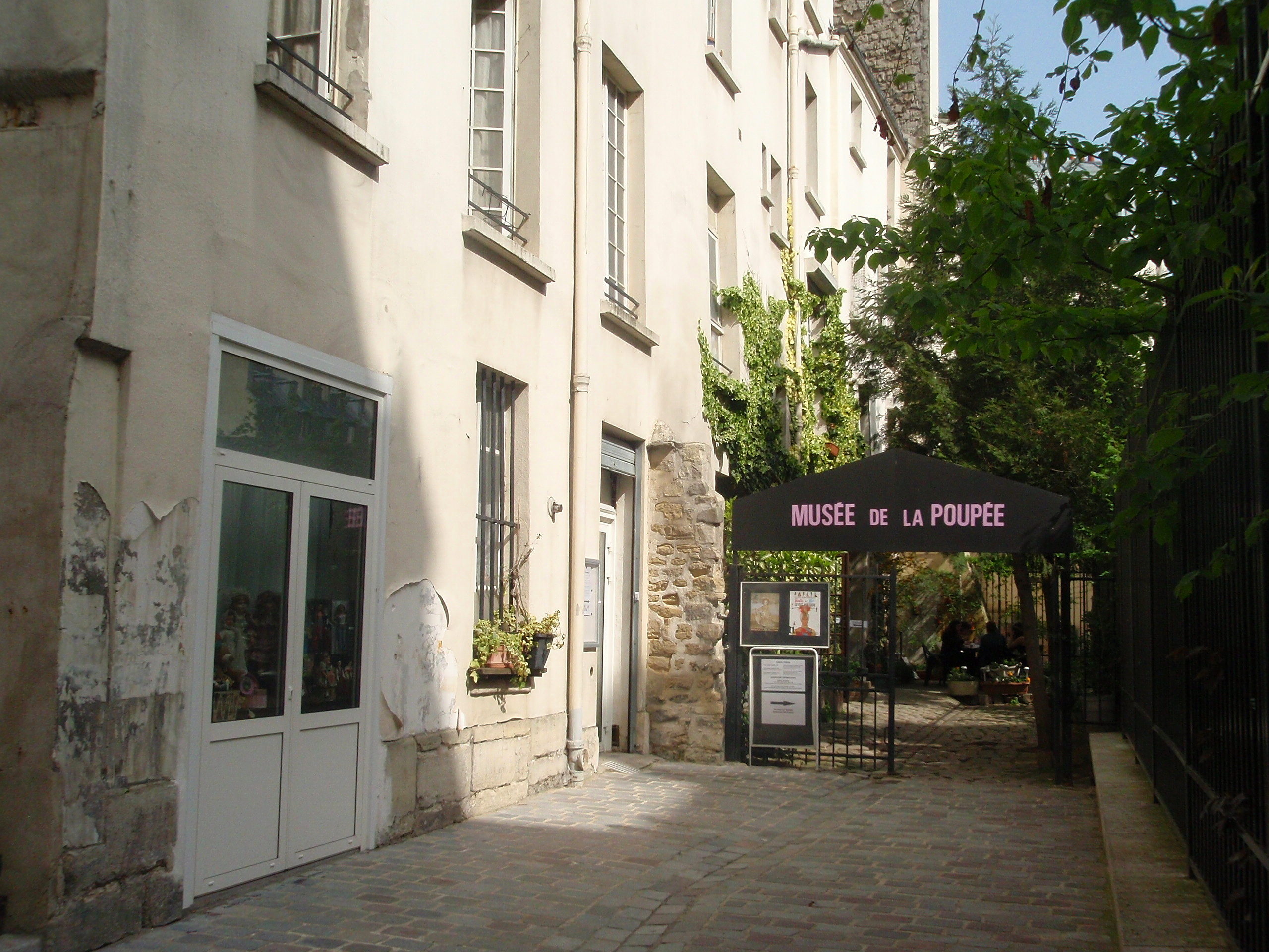 Musée de la Poupée